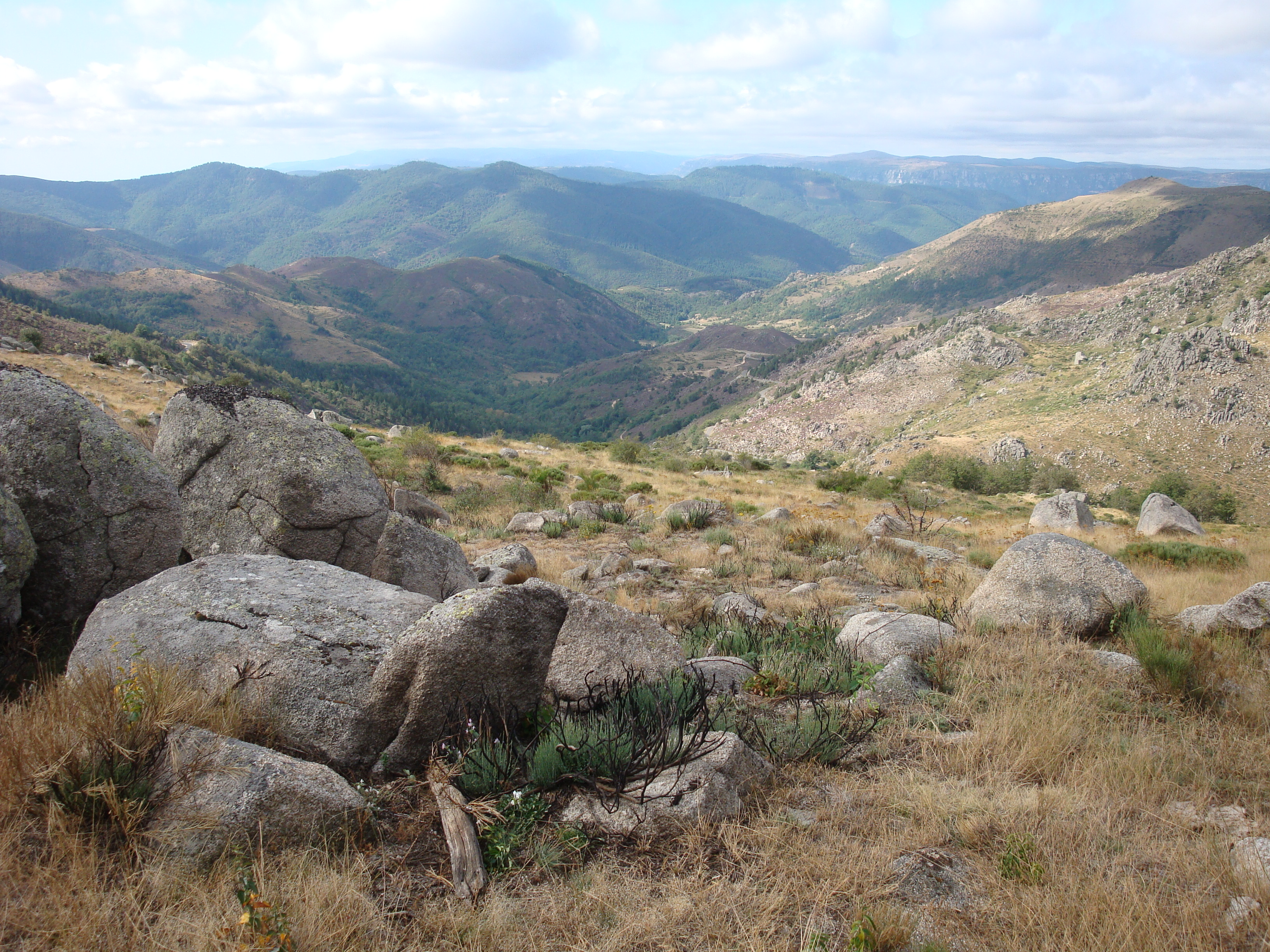 Paysage à proximité de la cascade de Runes, en Lozère.